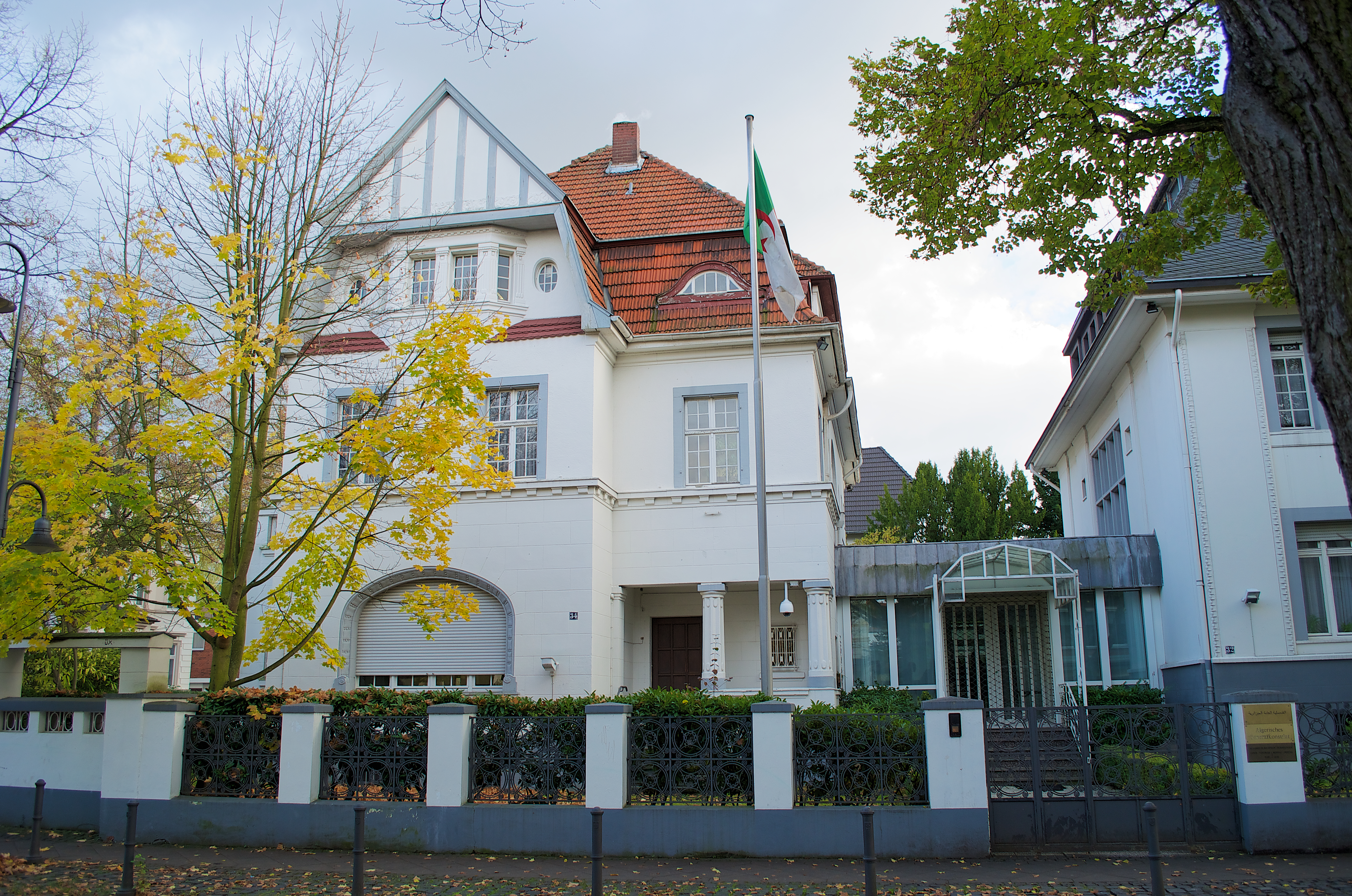 Denkmalgeschützte Villa Rheinallee 34 in Bad Godesberg (ehem. Botschaft und bis Ende 2013 Generalkonsulat von Algerien), Ortsteil Godesberg-Villenviertel